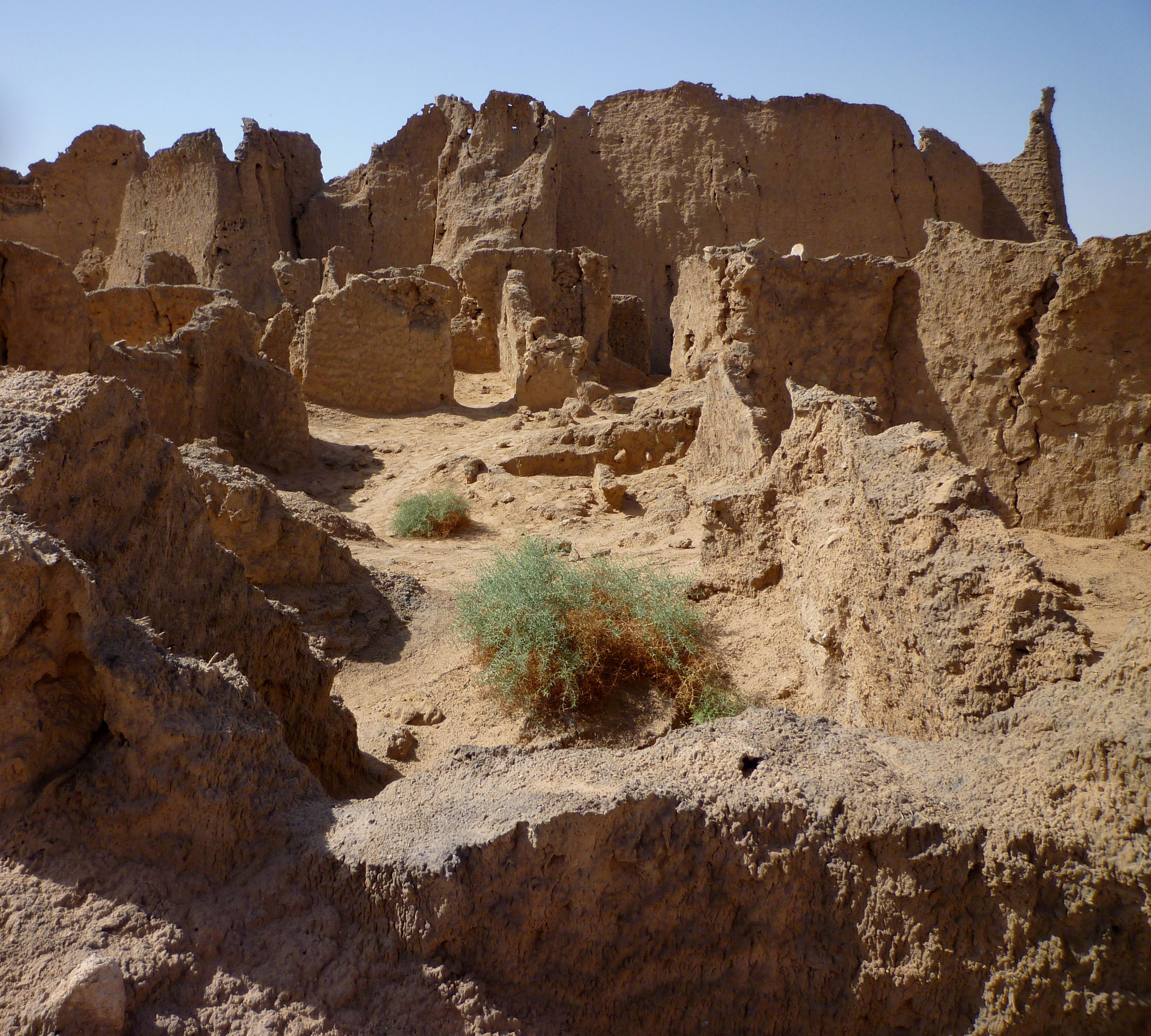 Garma (Garama) - Ruinen der antiken Stadt Garma02